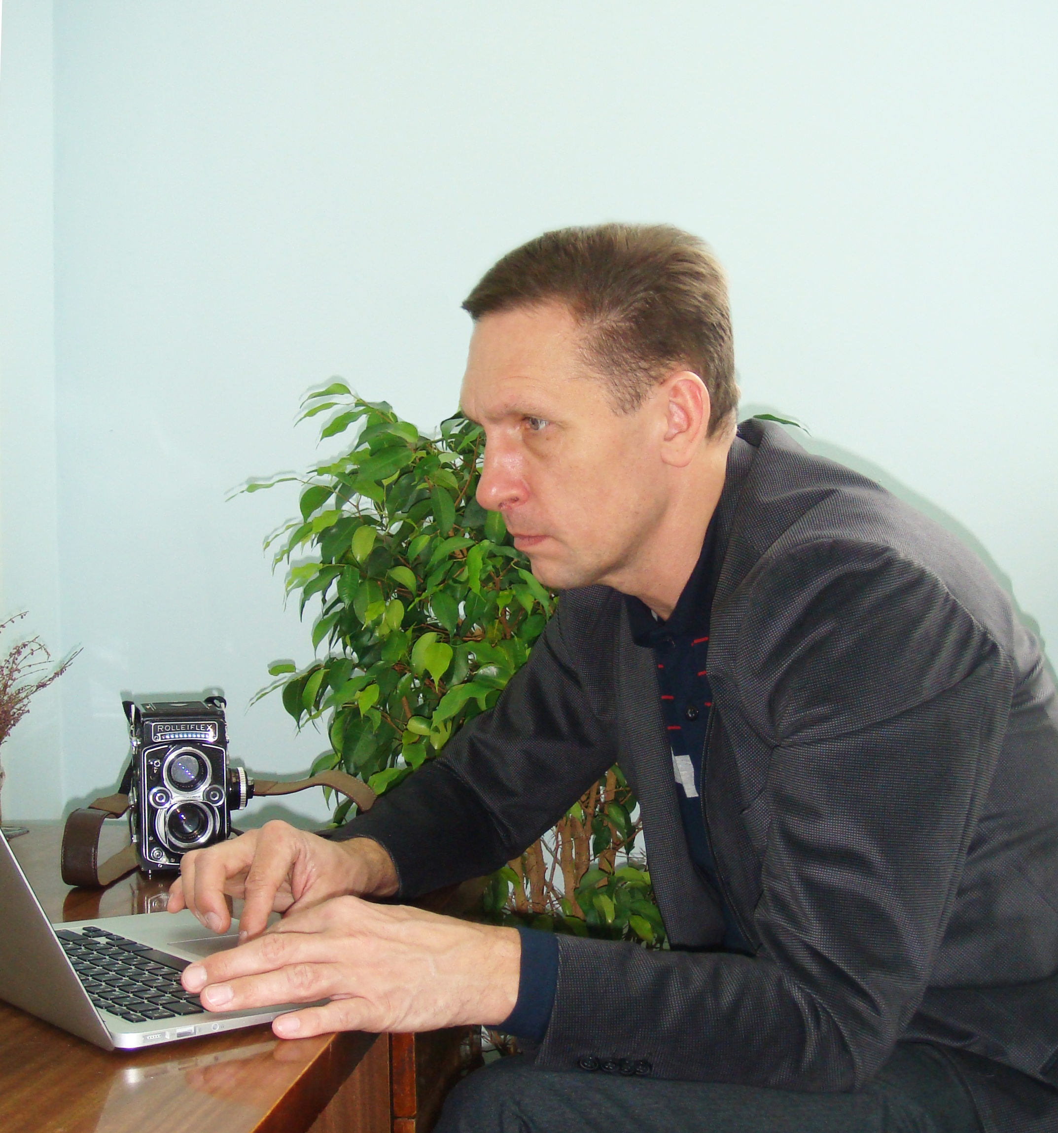 Олександр Чекменьов під час фотозйомок в ННПМ - за компом